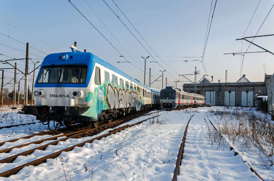 Spalinowe zespoły trakcyjne SN84-001 i SN83-003 odstawione na terenie byłego Śląskiego Zakładu Przewozów Regionalnych przy ul. Raciborskiej w Katowicach. Tabor został przejęty przez Komornika Sądowego i oczekuje na licytację komorniczą.